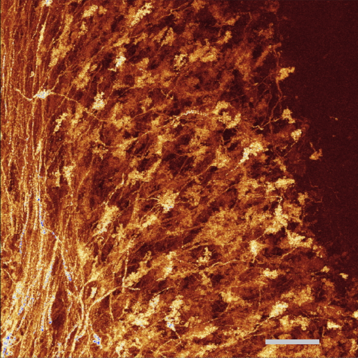 Moosfasern und deren Endigungen in der Körnerzellschicht des Kleinhirns. Markierung der Moosfasern mit Clomeleon, einem fluoreszierenden Biosensor, exprimiert unter der Kontrolle des Thy1 Promotors (Linie 11, Berglund et al. 2006, Brain Cell Biology 35, 207-235). Massstab 20 um.